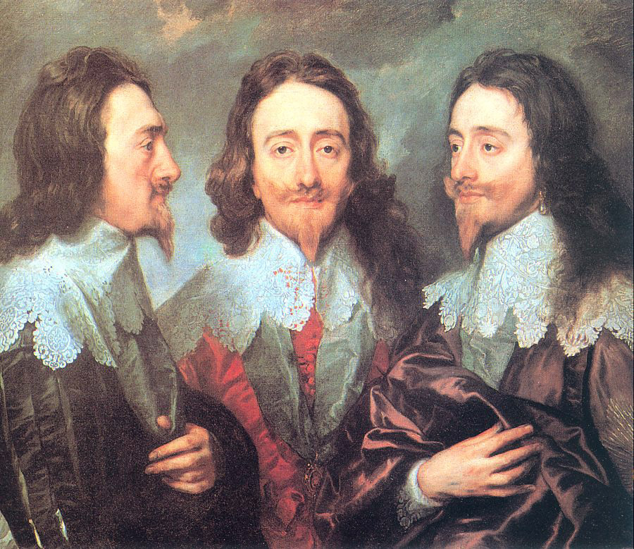 Charles I. Maler: Anthonis van Dyck Zeit: 1635-1636 Technik: Öl auf Leinwand Ort: Royal Collection, Windsor Castle, London, United Kingdom